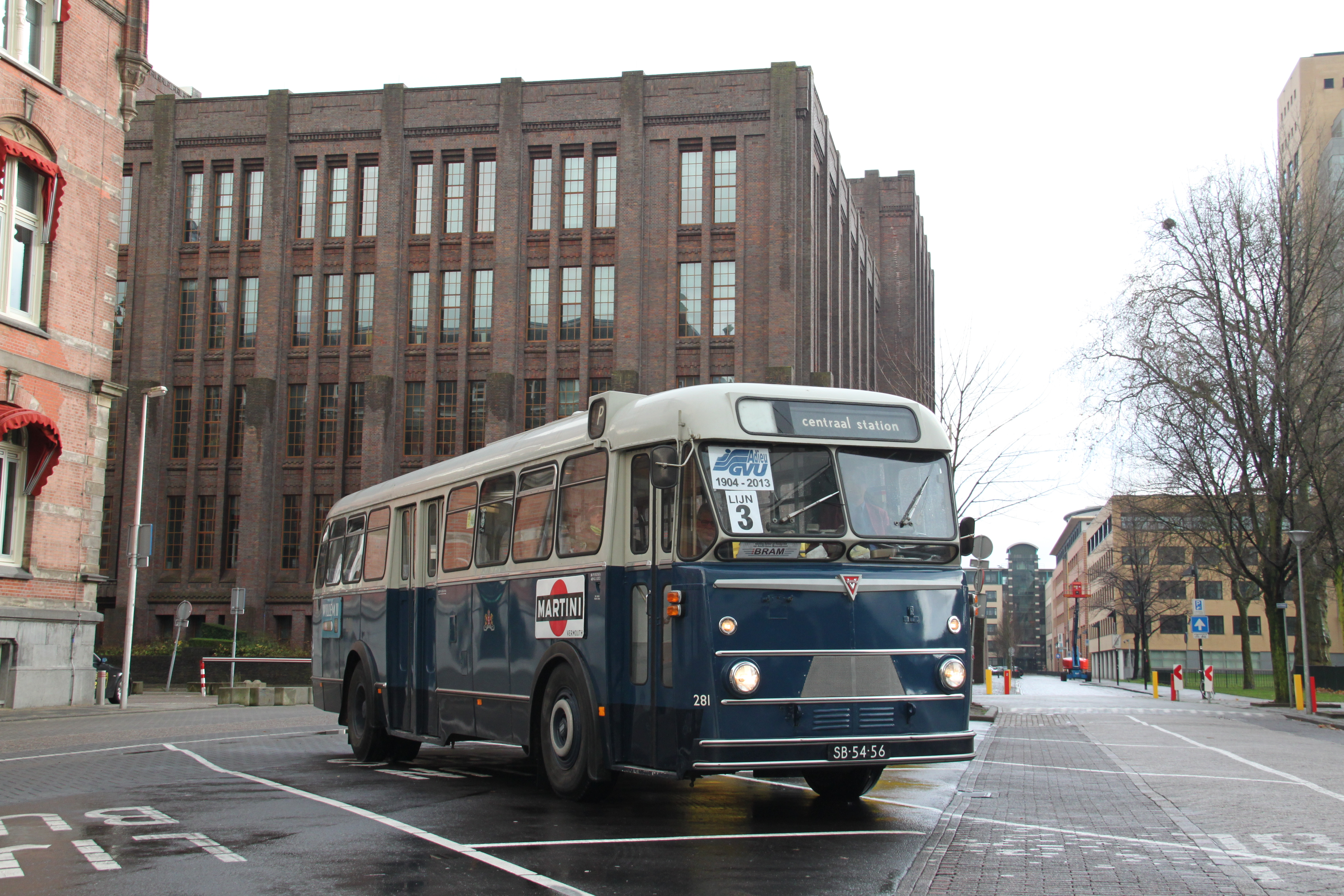 De GVB 281 van Stichting BRAM tijdens een van de extra ritten in Utrecht op de laatste dag van GVU.